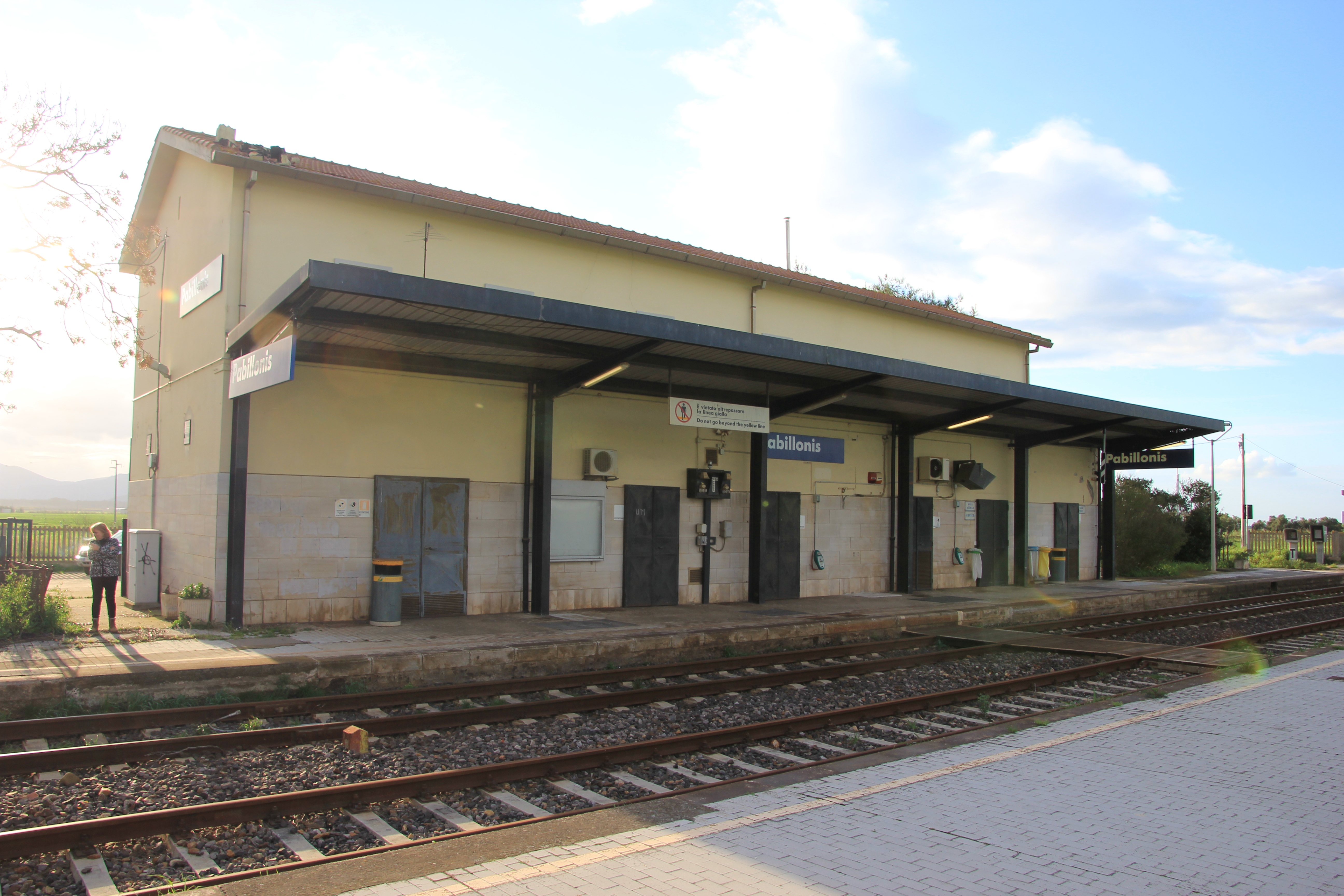 Pabillonis - Stazione ferroviaria